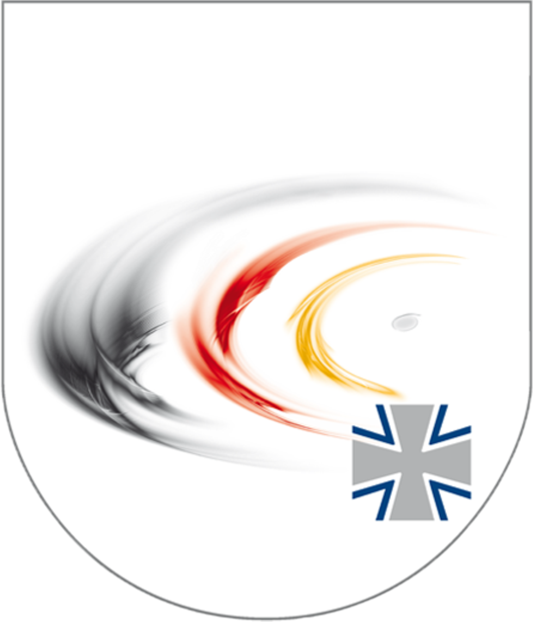 This file shows the internal coat of arms of Musikkorps der Bundeswehr (MusKorpsBw) of the Bundeswehr, the German Federal Defence Force. → more → help on abbreviations